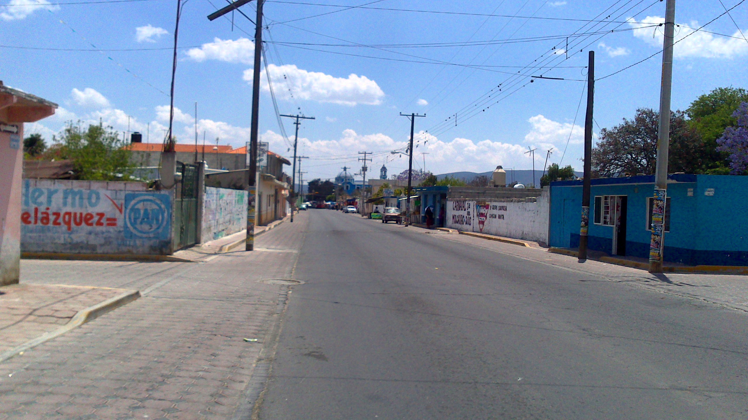 salida de Tepeyahualco entrando a molcaxac